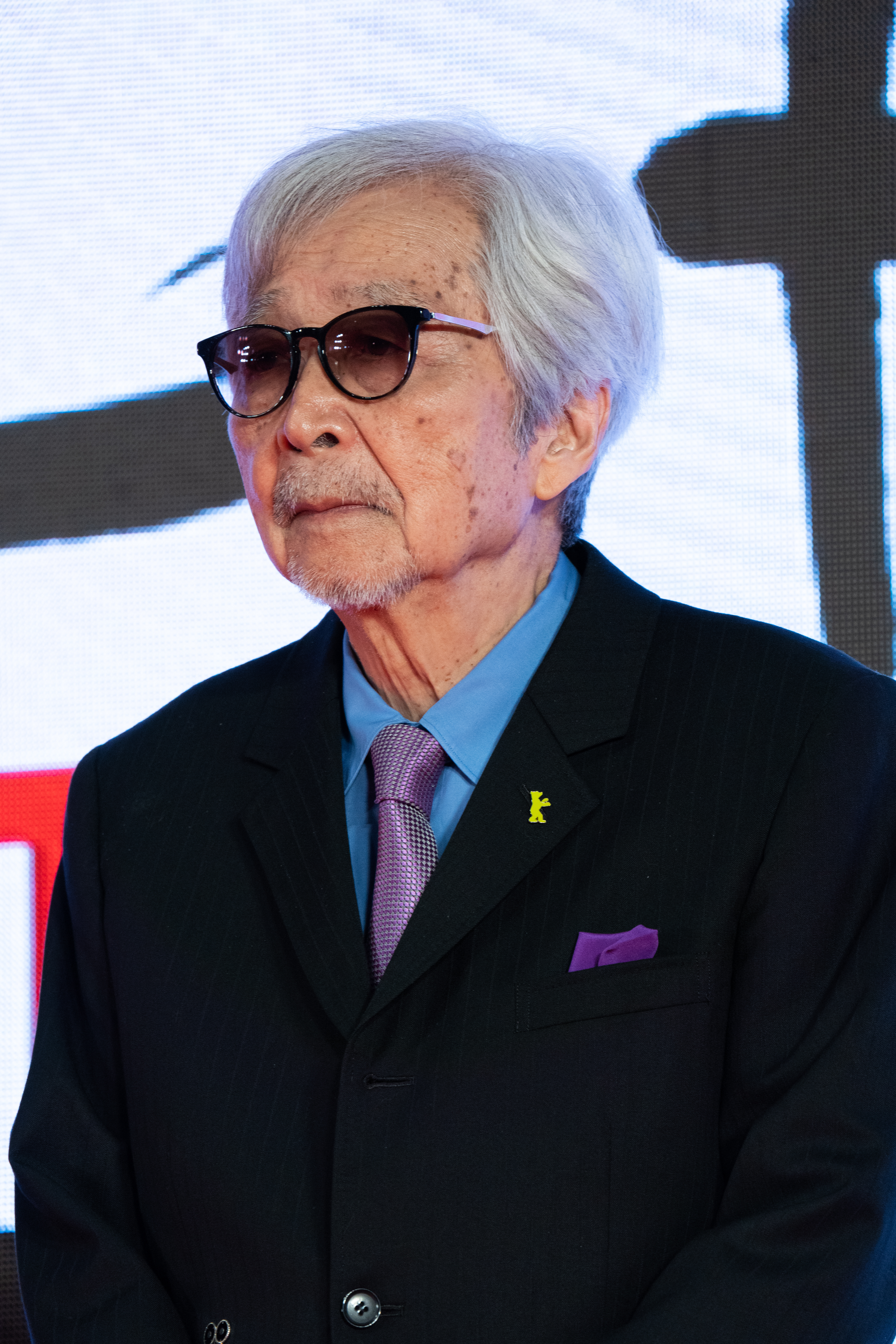 第32回 東京国際映画祭 オープニングセレモニー 山田洋次 (男はつらいよ お帰り 寅さん)